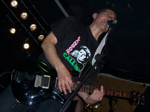 Iñigo Muguruza en un conciertyo de Sagarroi en Gruta77 (Madrid). 3 de julio de 2007.